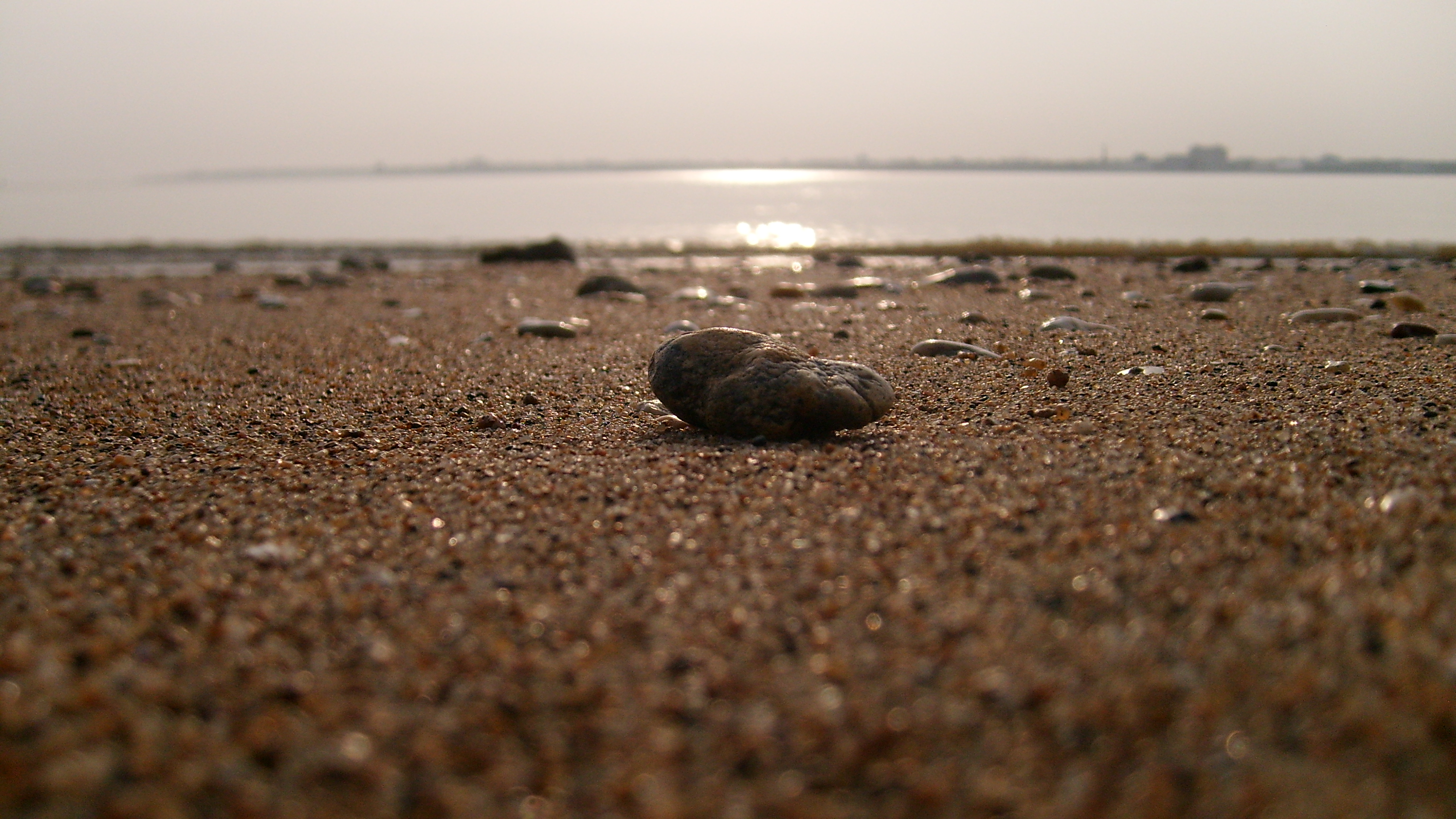 Galet sur la plage de saint brévin les pins